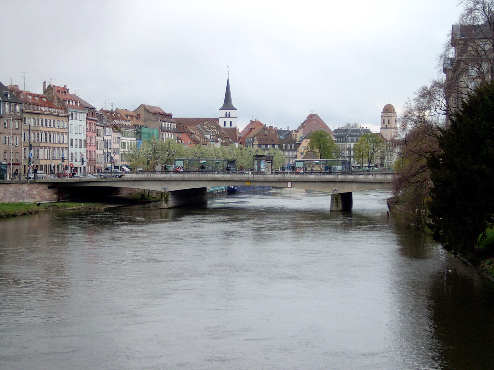 An der Ill in Straßburg.